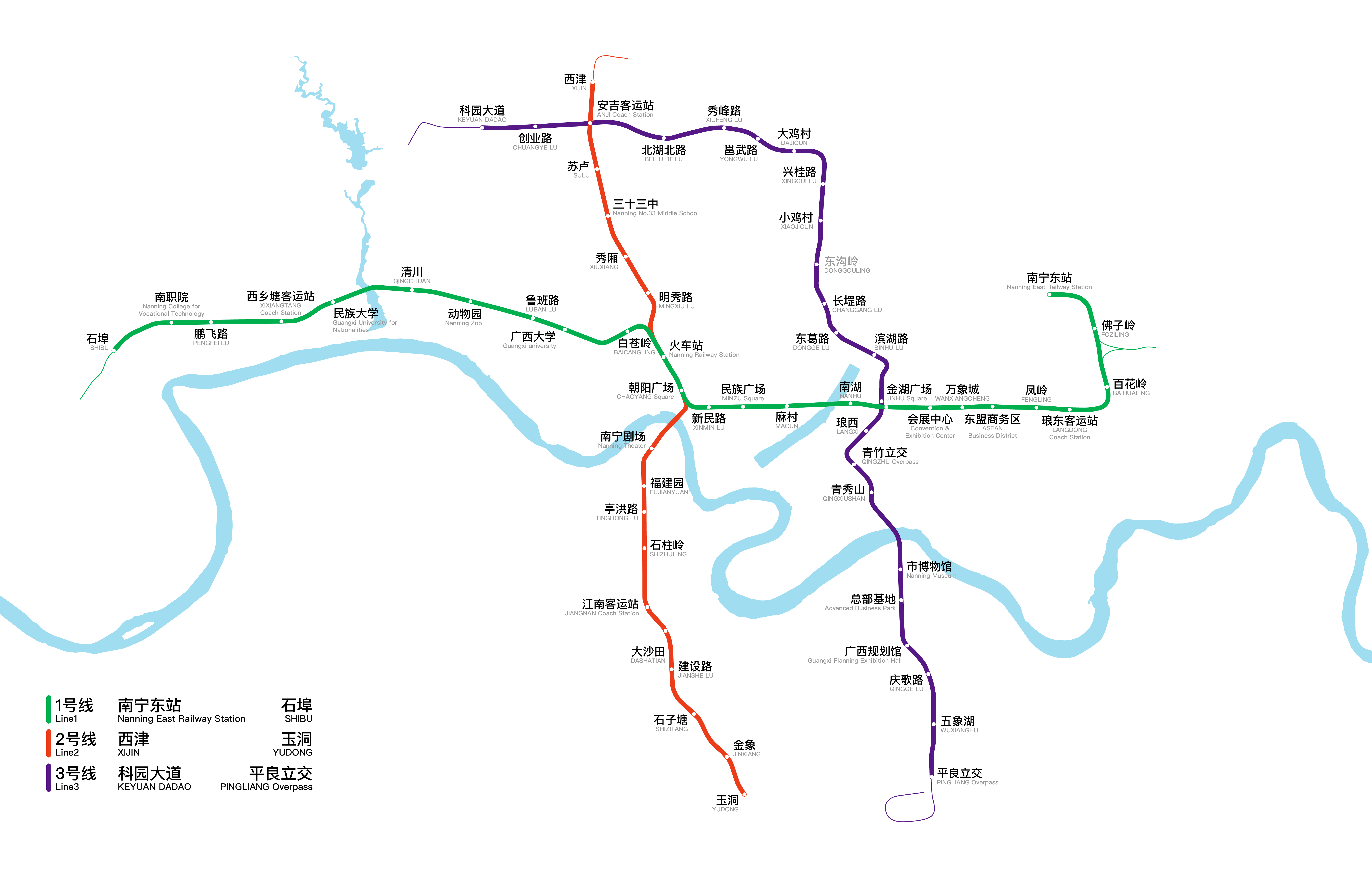 中文（中国大陆）: 南宁轨道交通运营线路图，更新于2018年6月